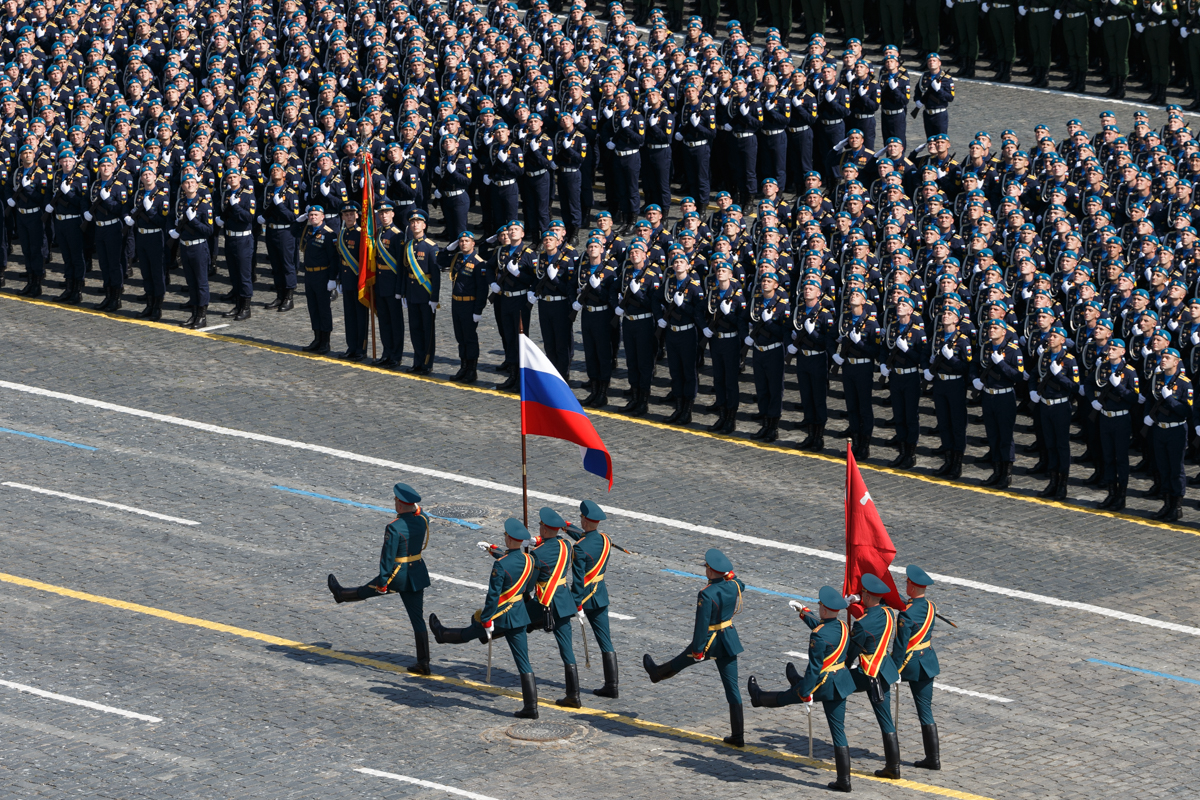 Парад Победы в Москве, посвященный 75-й годовщине Победы в Великой Отечественной войне